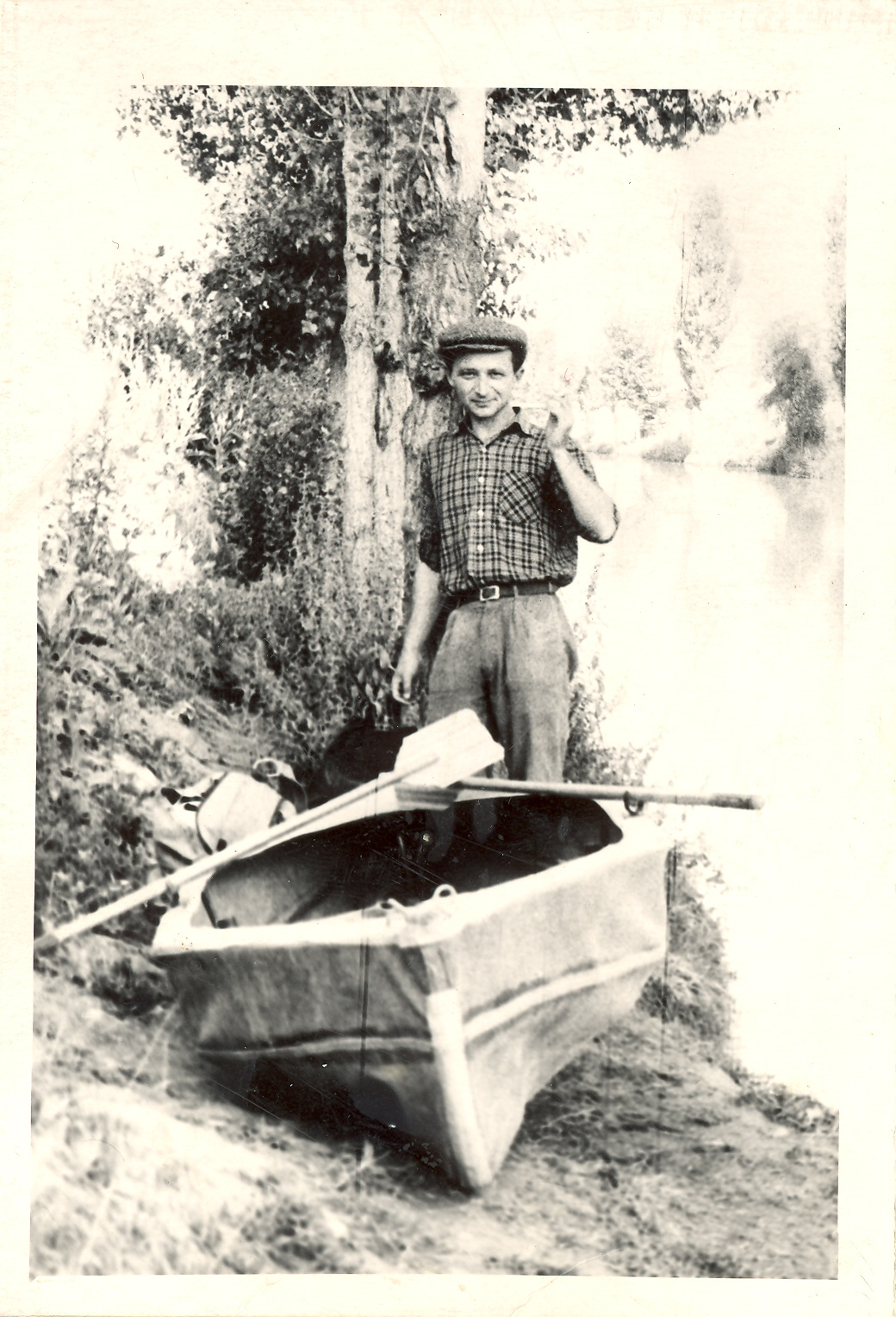 В юности